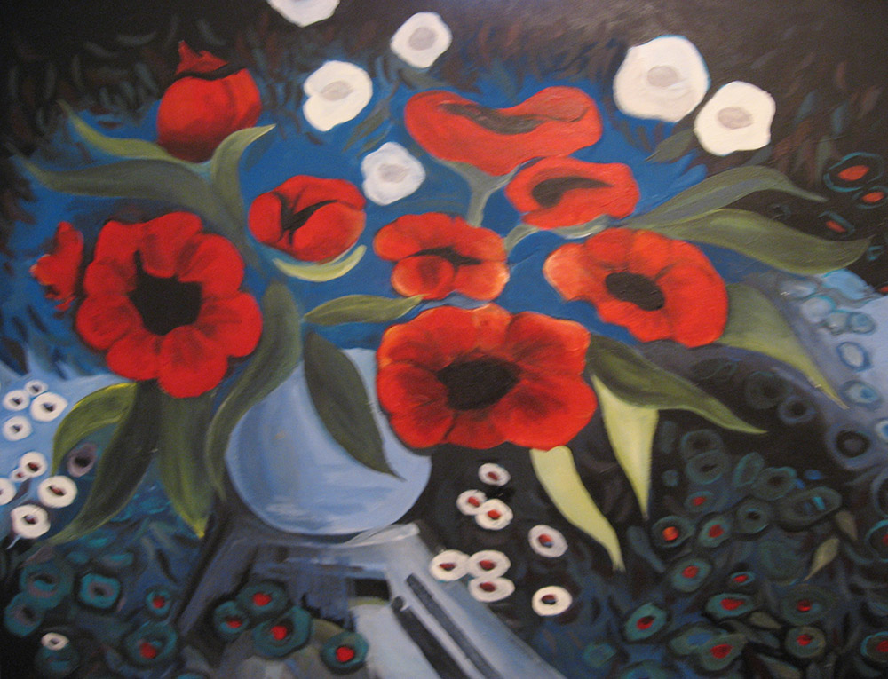 ייצוג אסתטי ואופטימי אקריליק על בד 2007 עמיקם בר גרמא